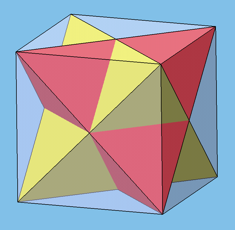 Im Würfel findet man genau zwei Tetraeder, die zu einem Sterntetraeder verschmelzen.